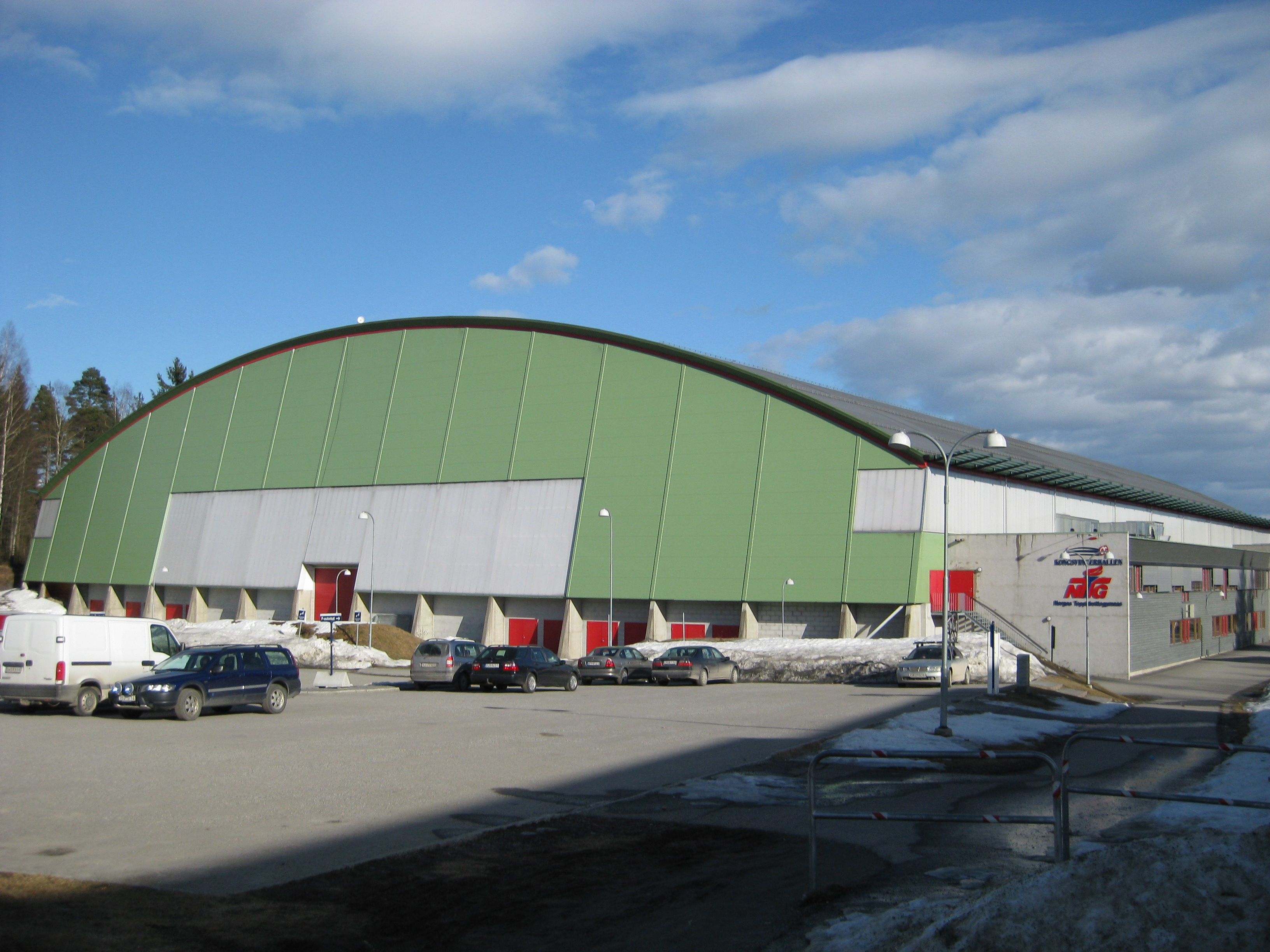 Kongsvingerhallen, en innendørs fotballbane åpnet den 14. desember 1997.